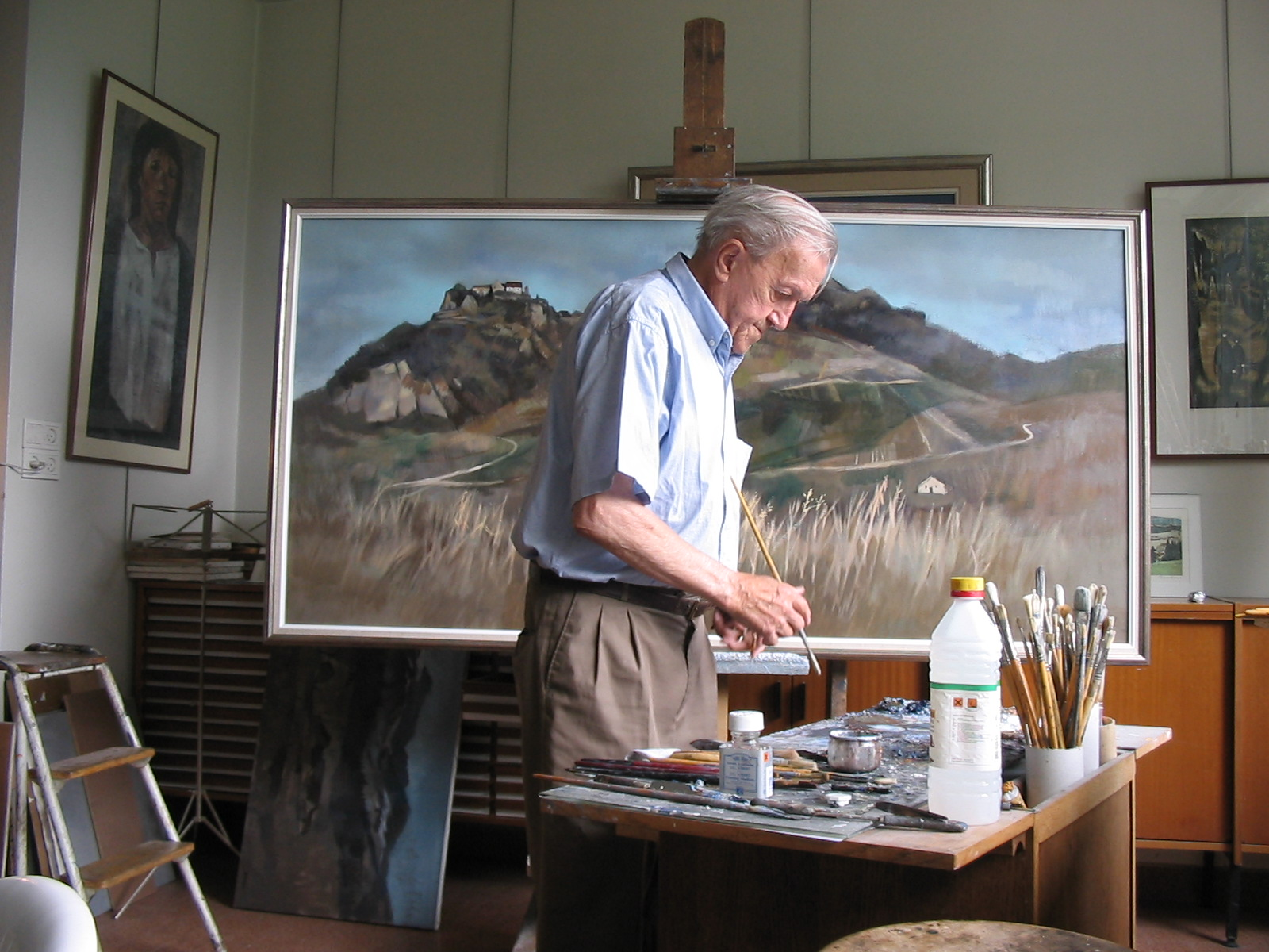 Pierre Bichet dans son atelier à Pontarlier (Doubs), termine une grande toile représentant Chateau Chalon.